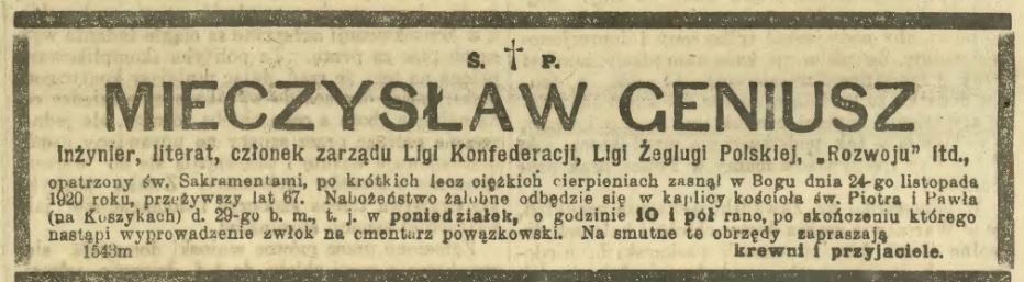 Nekrolog z gazety Kurjer Warszawski